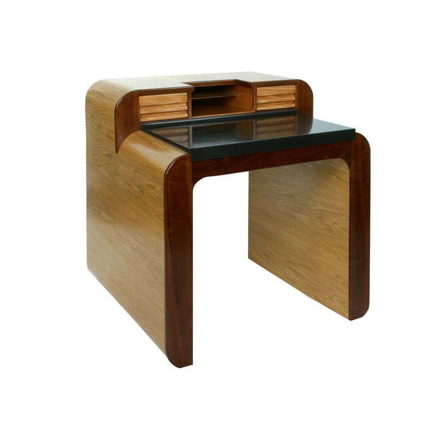 Desk for John Lennon by Dakota Jackson